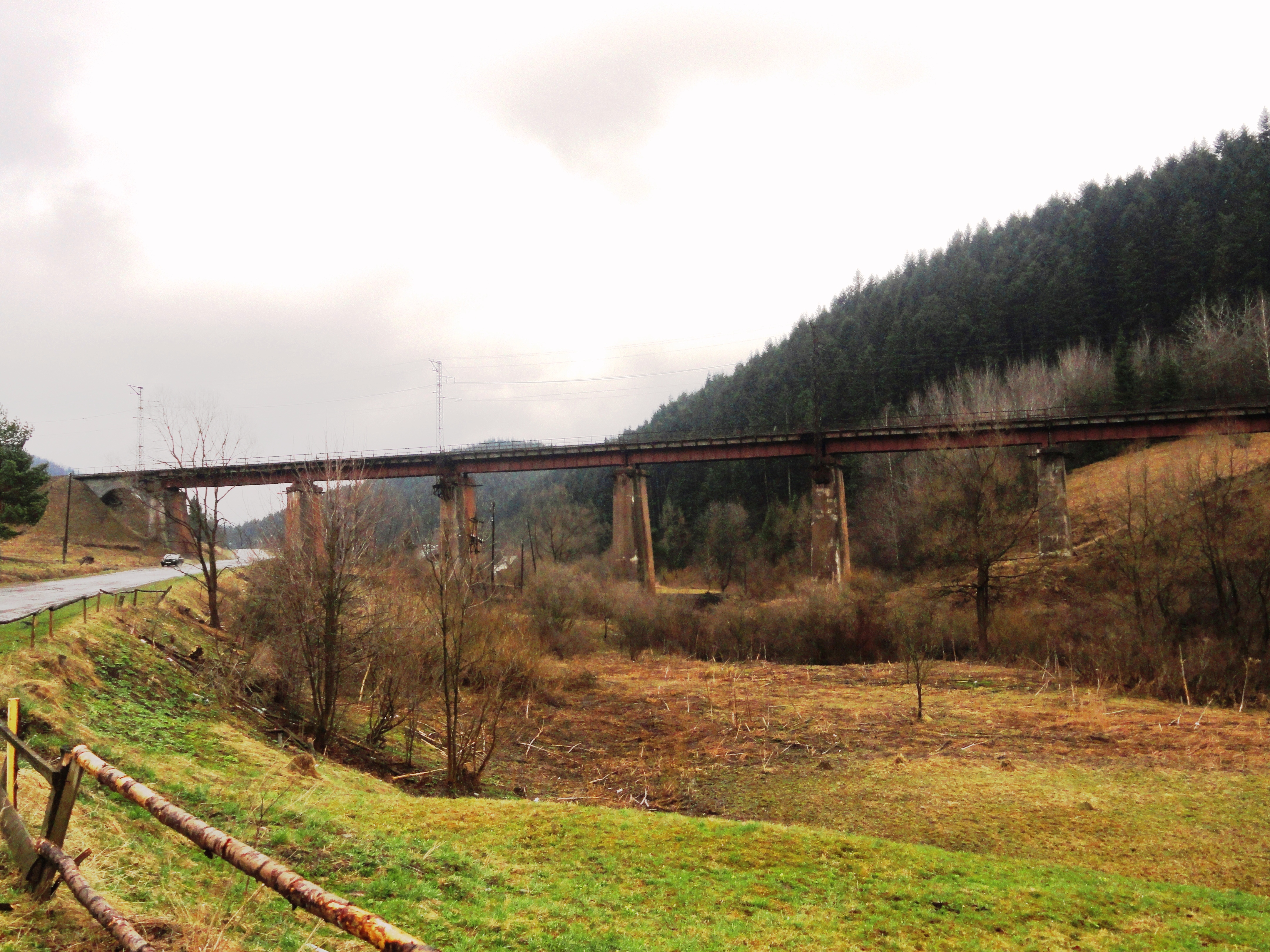 Виадук в с.Розлуч Турковского района Львовской области